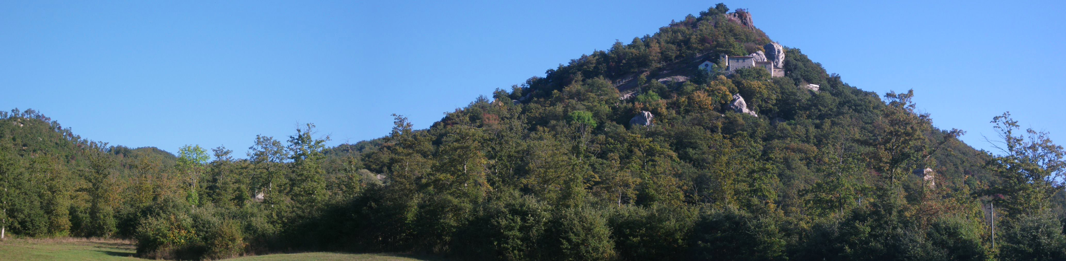 Veduta della balza di Cerbaiolo